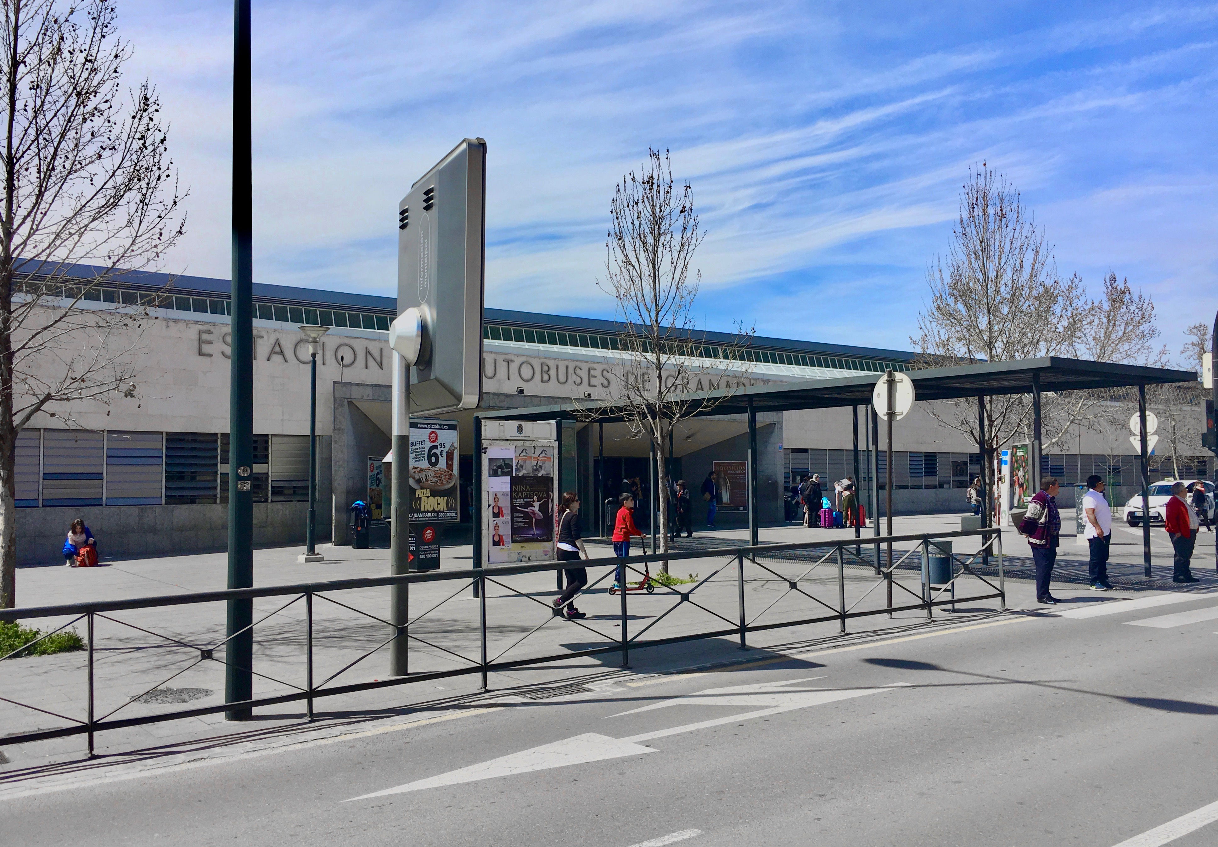 Entrada principal de la estación de autobuses de Granada (España)